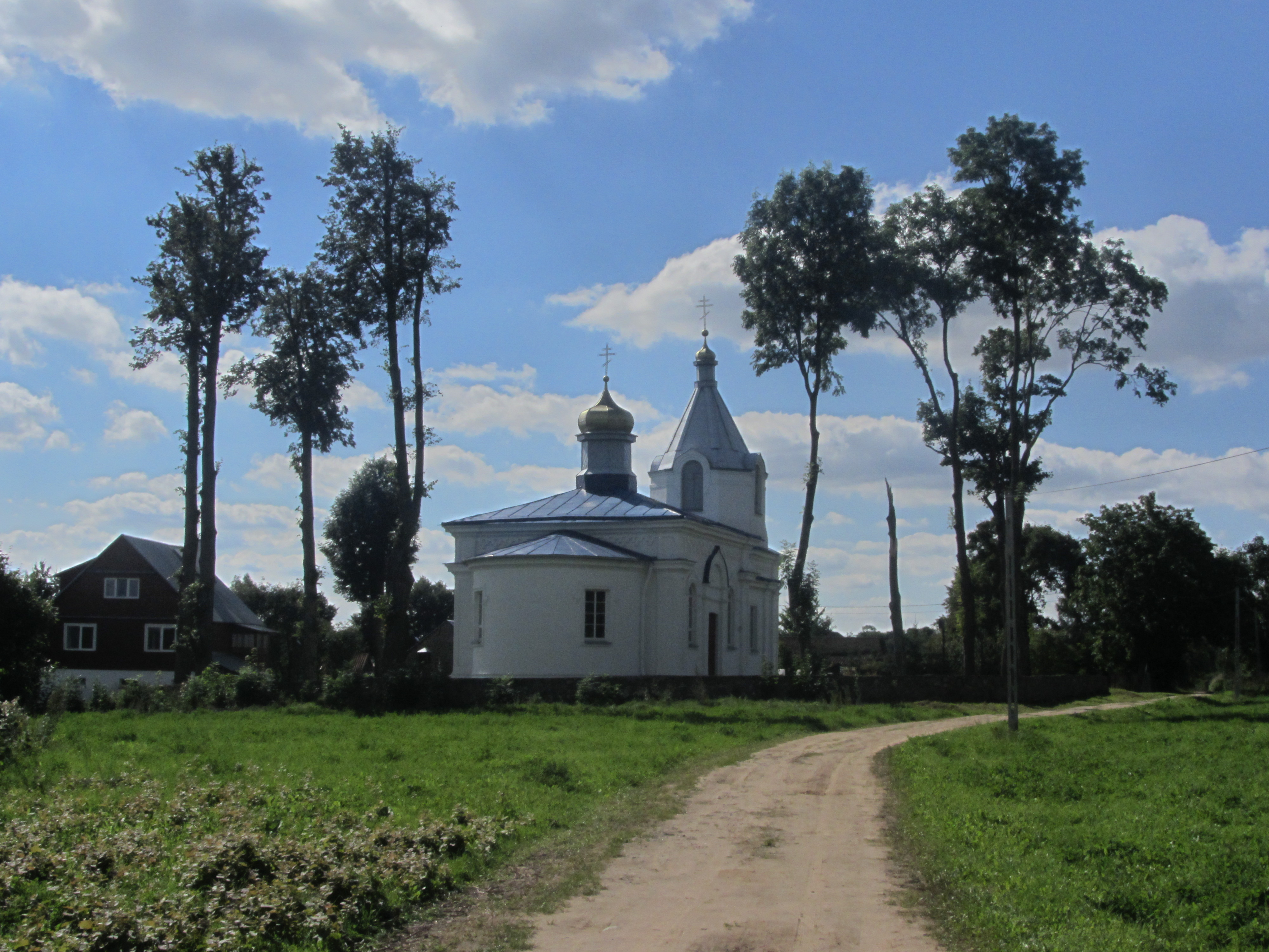 Topilec - zespół cerkwi prawosławnej: Cerkiew prawosławna parafialna p.w. św. Mikołaja (zabytek nr 368 z 23.10.1975)